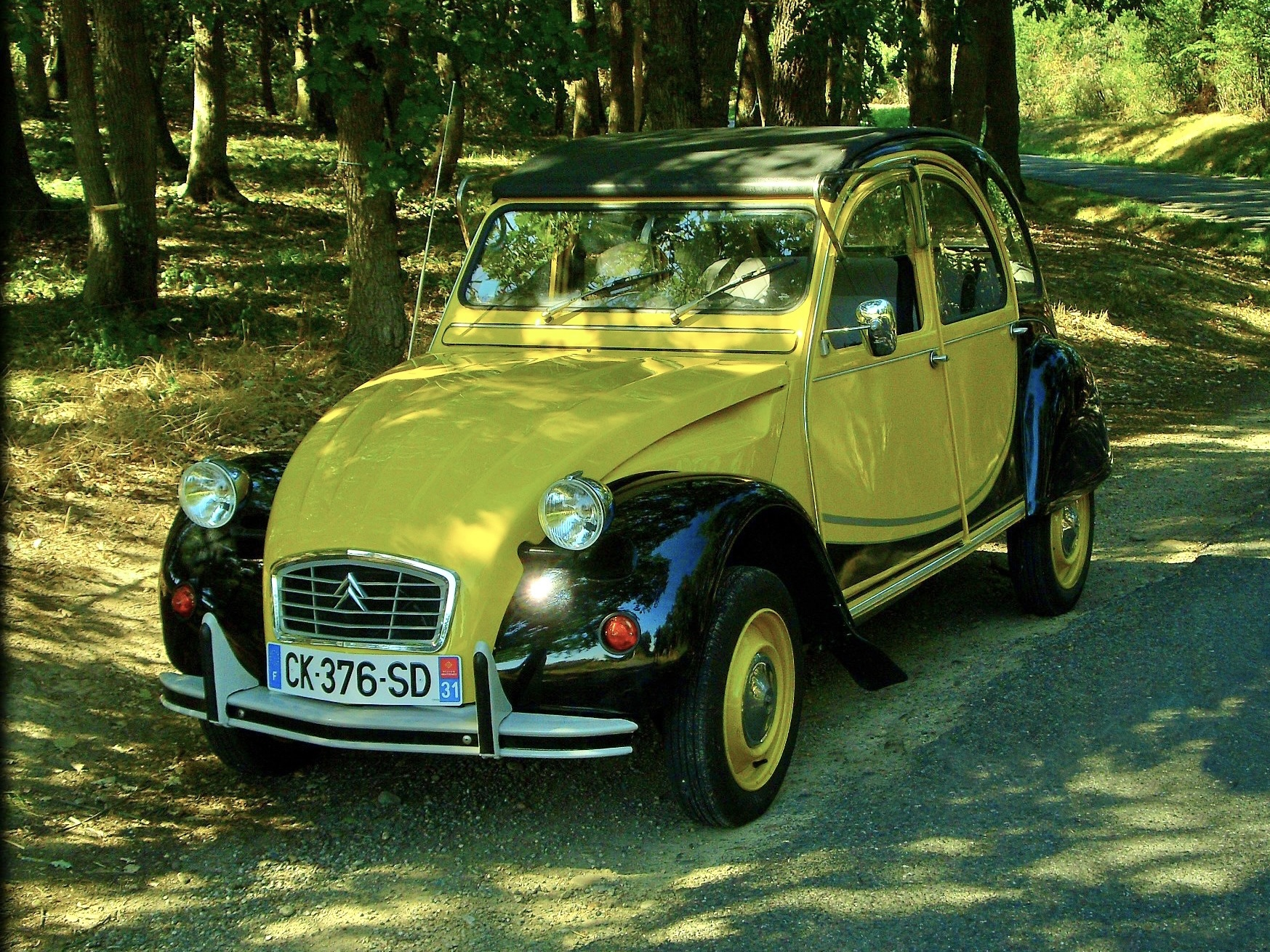 Citroen 2CV charleston yellow/ Black 1982